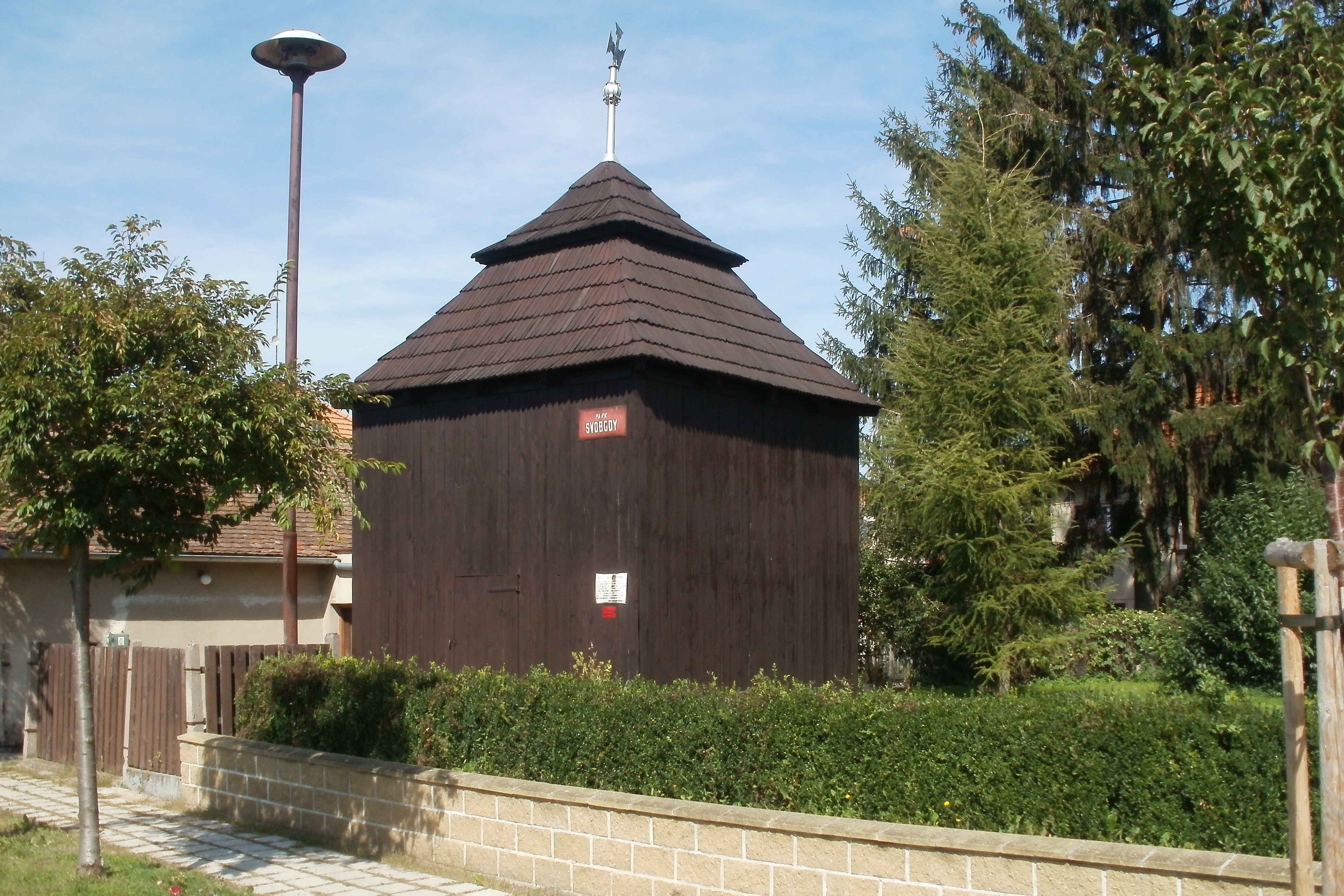 Zvonice dřevěná (Končice), na býv. hřbitově, Končice